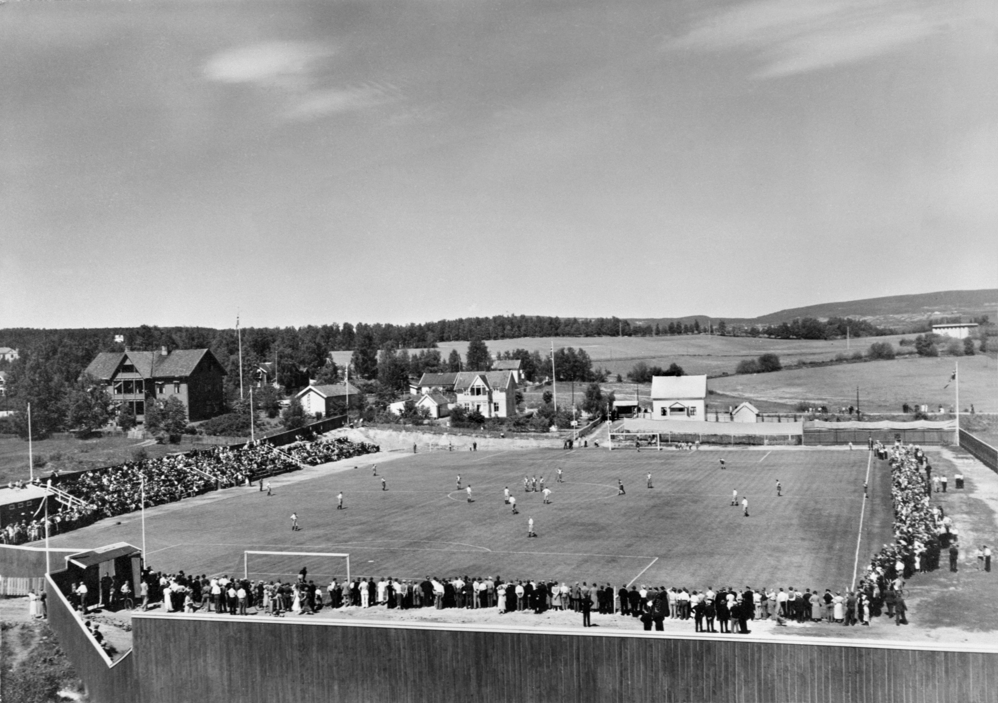 Briskeby gressbane